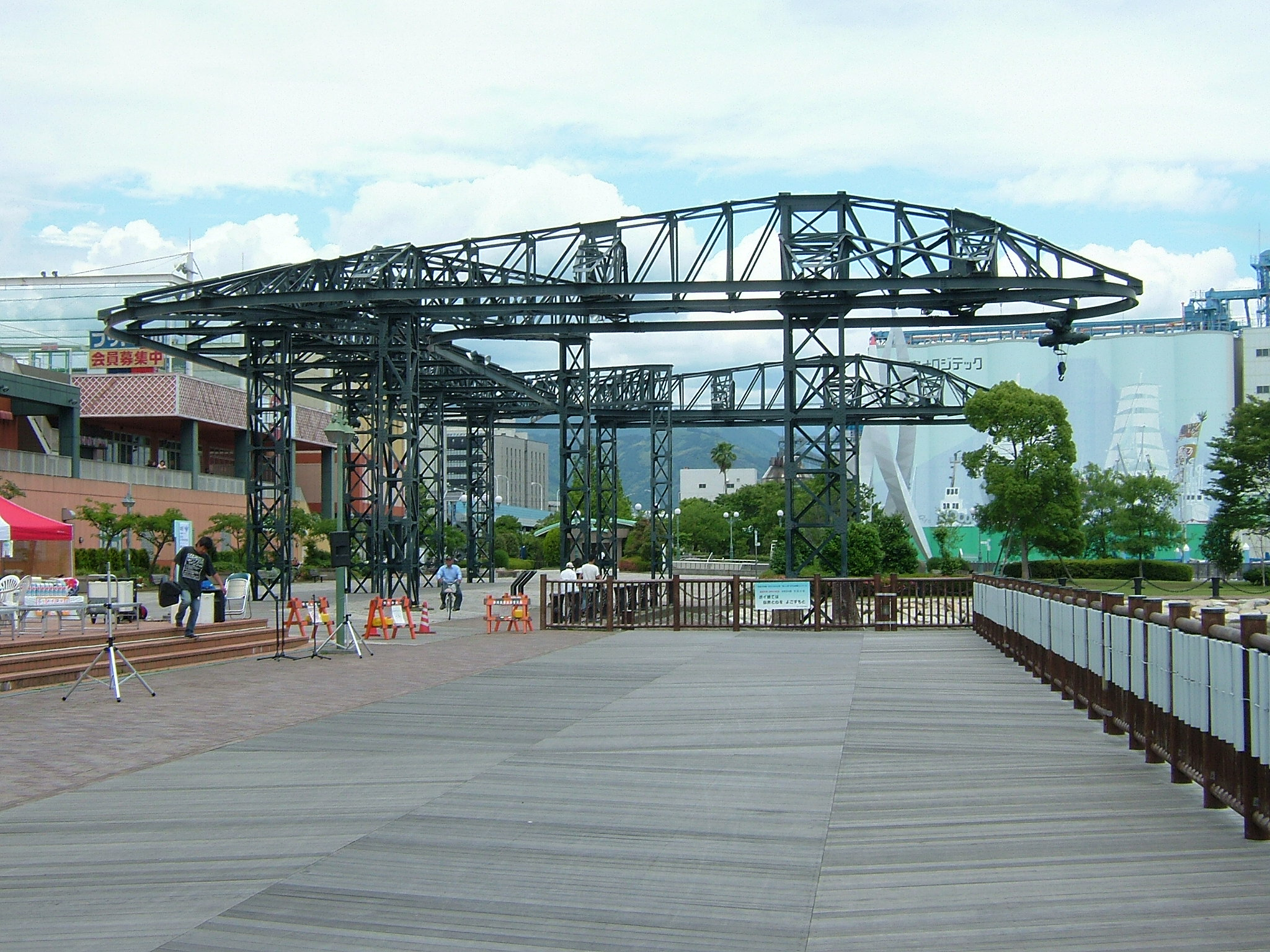 清水マリンパークで保存展示しているテルファークレーン